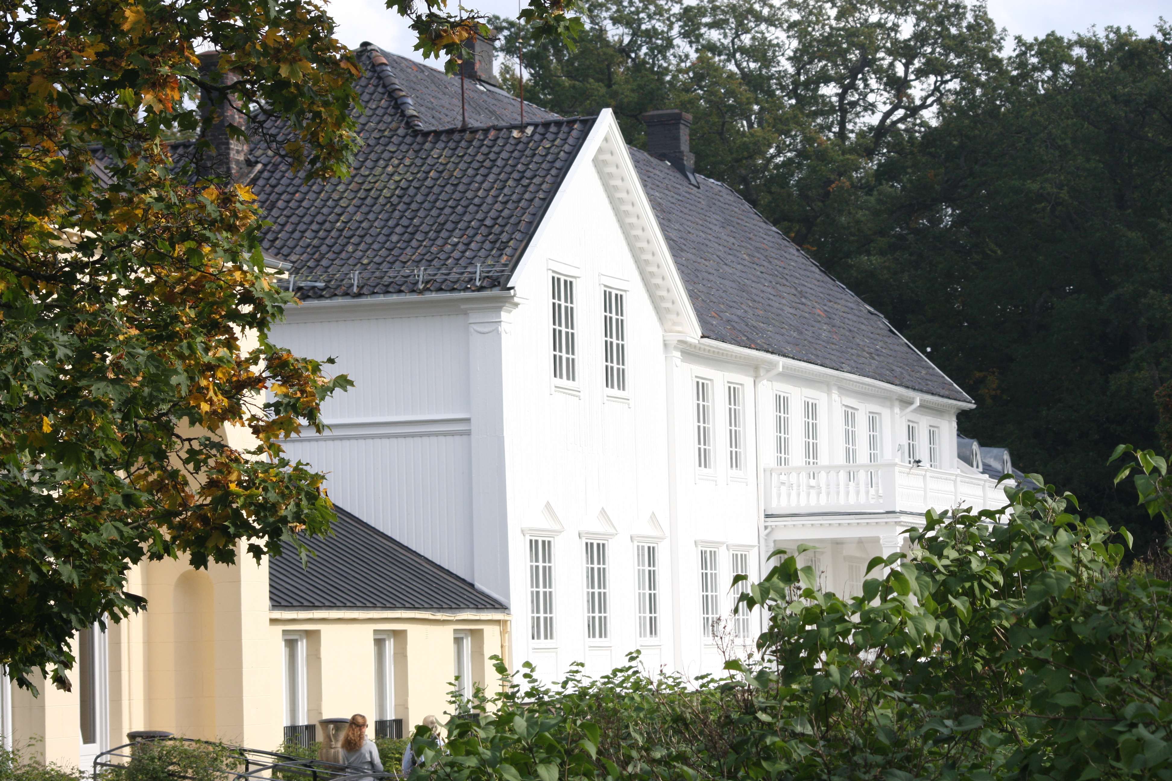 Röd manor in Halden, southeastern Norway. The manor has belonged to several families, and was visited by Thomas Robert Malthus in 1799.